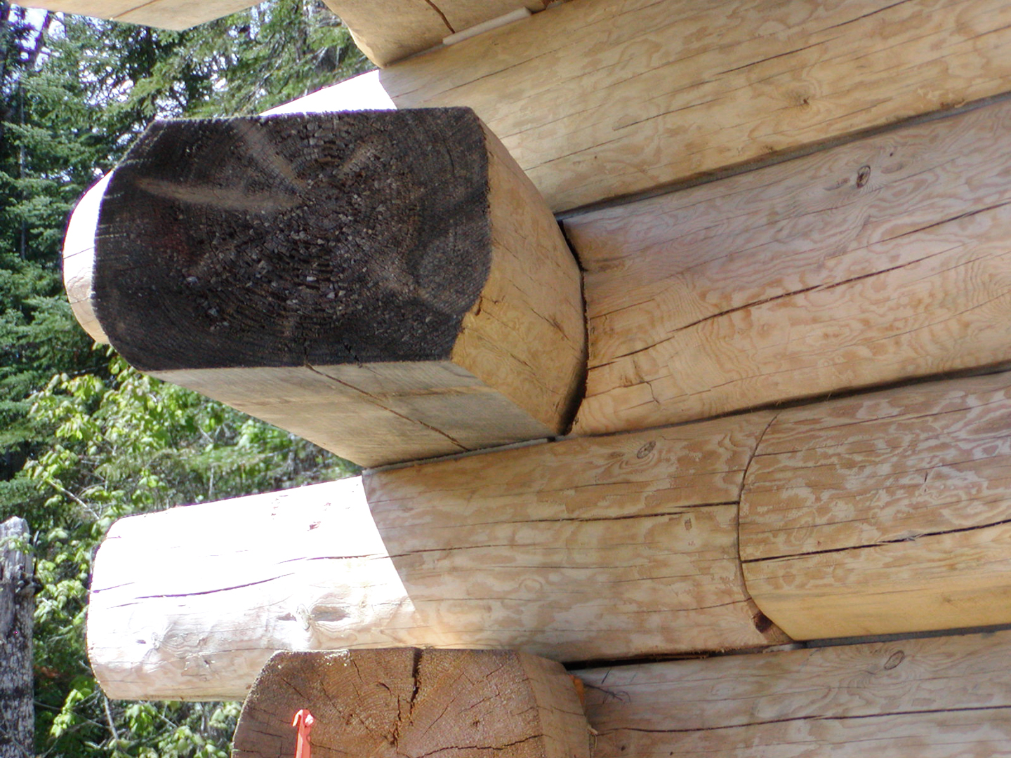 Labi ulatuv nurk